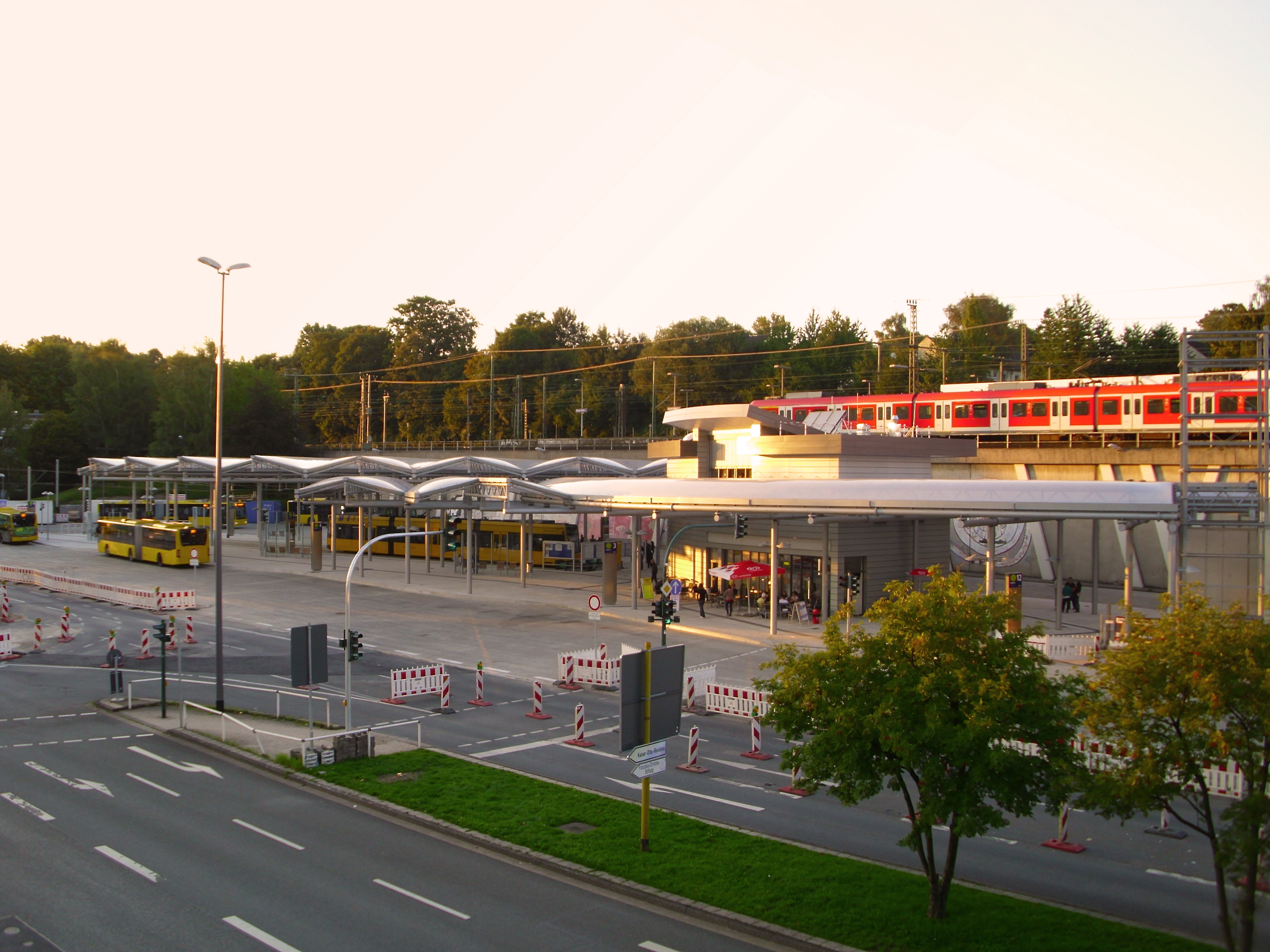 Der Steele S-Bahnhof nach Umbau 2010. Das Fahrzeug auf dem Bild kann eine DBAG-Baureihe 423 oder eine DBAG-Baureihe 422 sein.